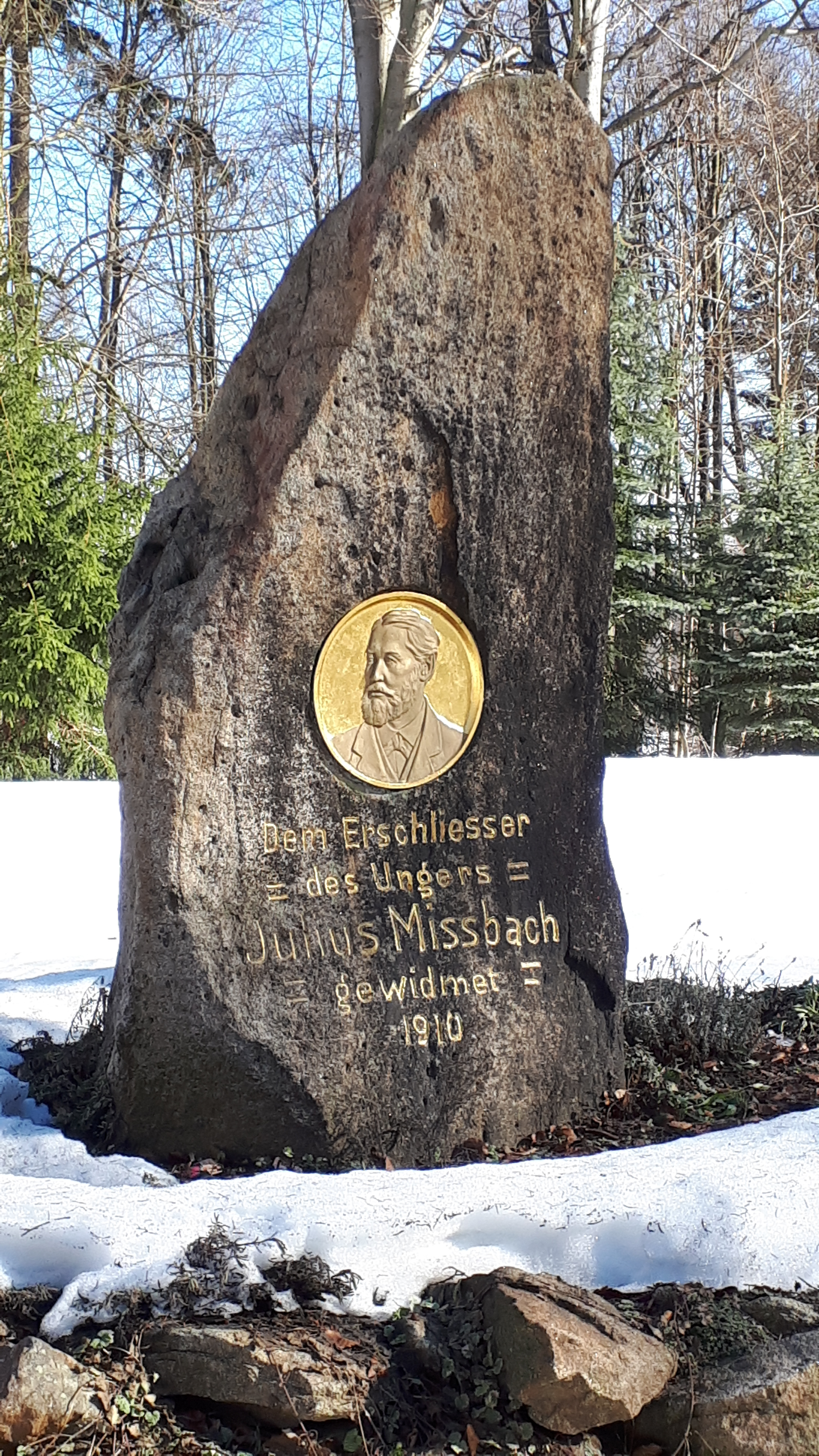 Gedenkstein für Julius Mißbach aus Neustadt in Sachsen auf dem Unger